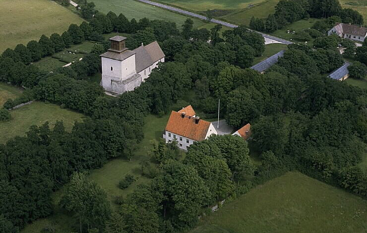 Motiv: Vamlingbo kyrka Nyckelord: Flygbilder, Riksintressen Kategori: KyrkomiljöVamlingbo kyrka